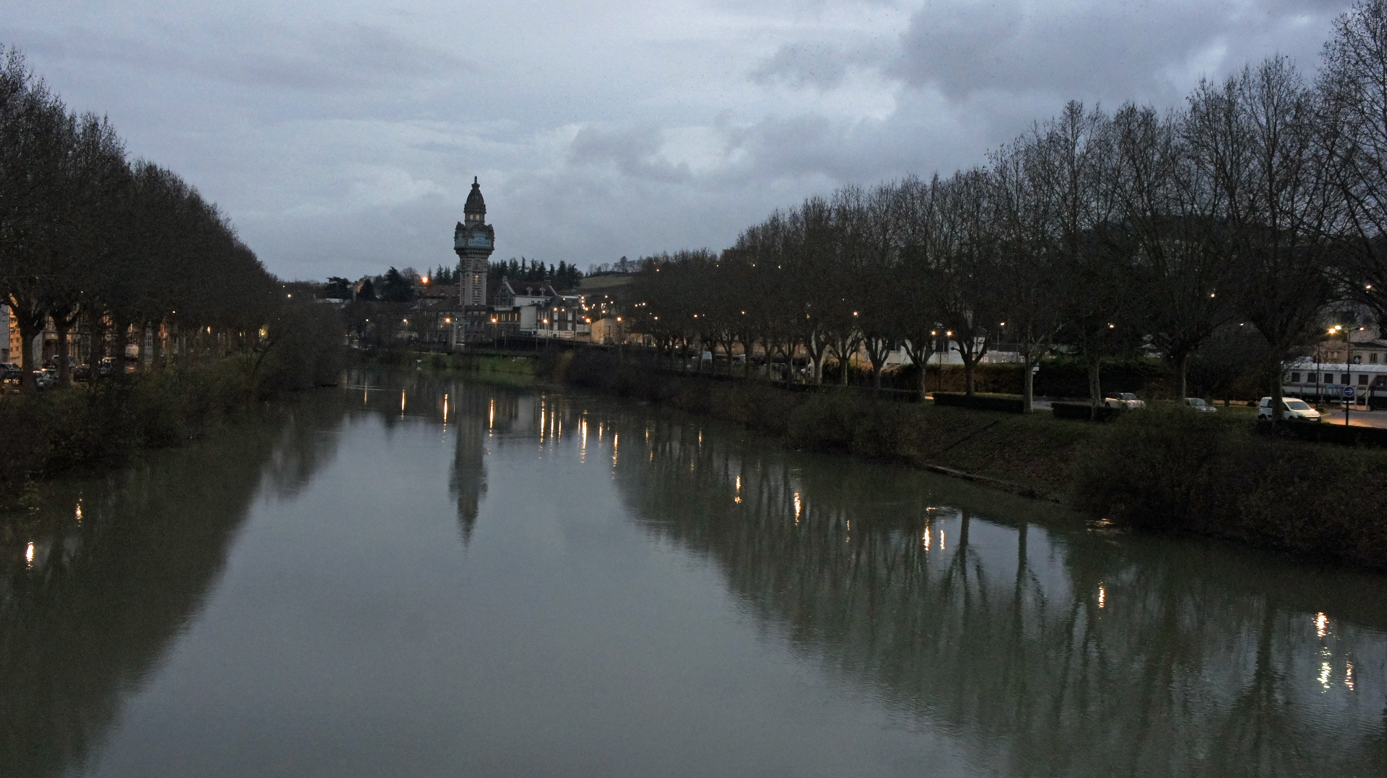 Une vue sur les bâtiments de Castellane .